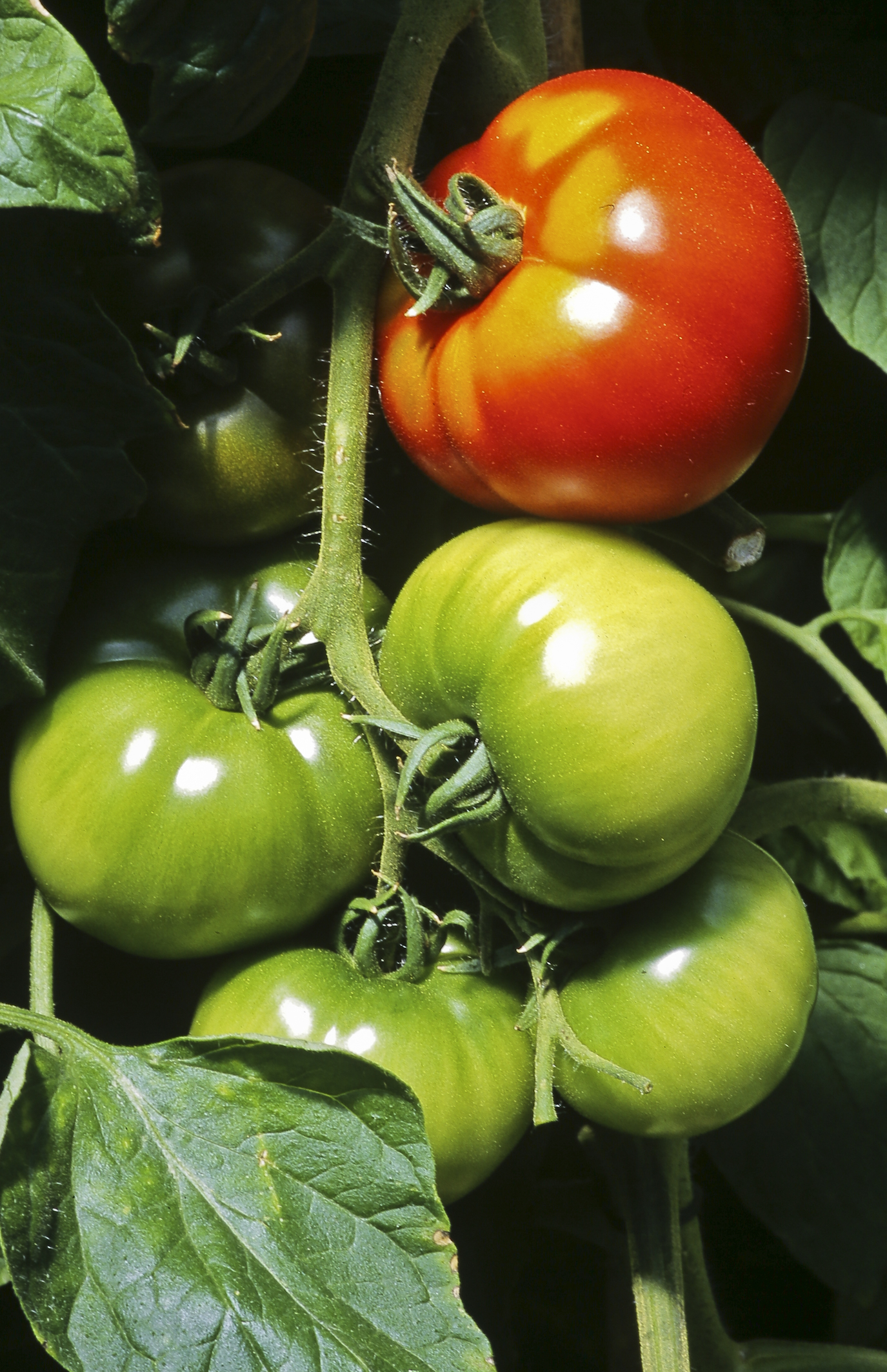 INRA, Jean Weber